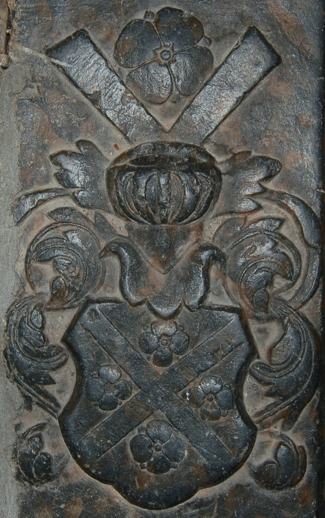 Slekten Kane på gravstein tilhørende Peder til Fresje i Hedrum kirke